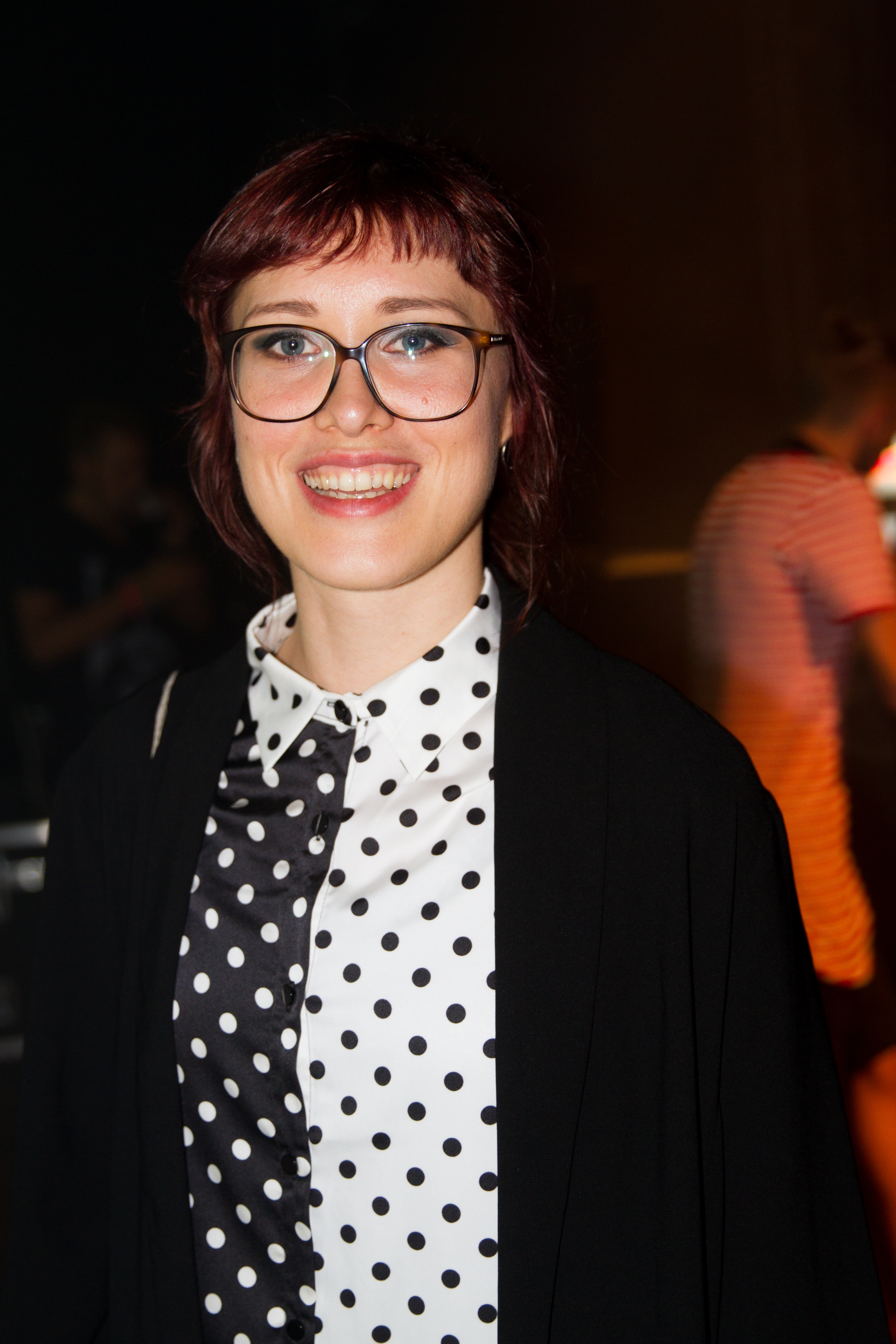 Babetta (Anika Zeising) beim 14. Airbeat-One Dance Festivals das vom 16. bis 19. Juli 2015 auf dem Flugplatz Neustadt-Glewe stattfand.